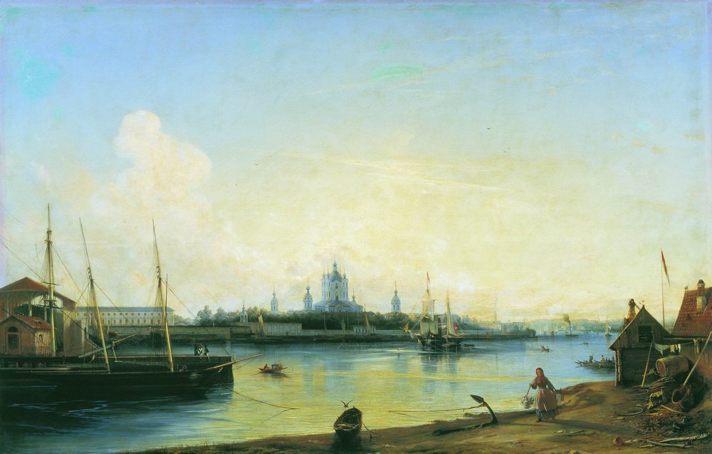 Smolny as seen from Bolshaya Okhtalabel QS:Lru,"Вид Смольного монастыря с Большой Охты." label QS:Len,"Smolny as seen from Bolshaya Okhta"